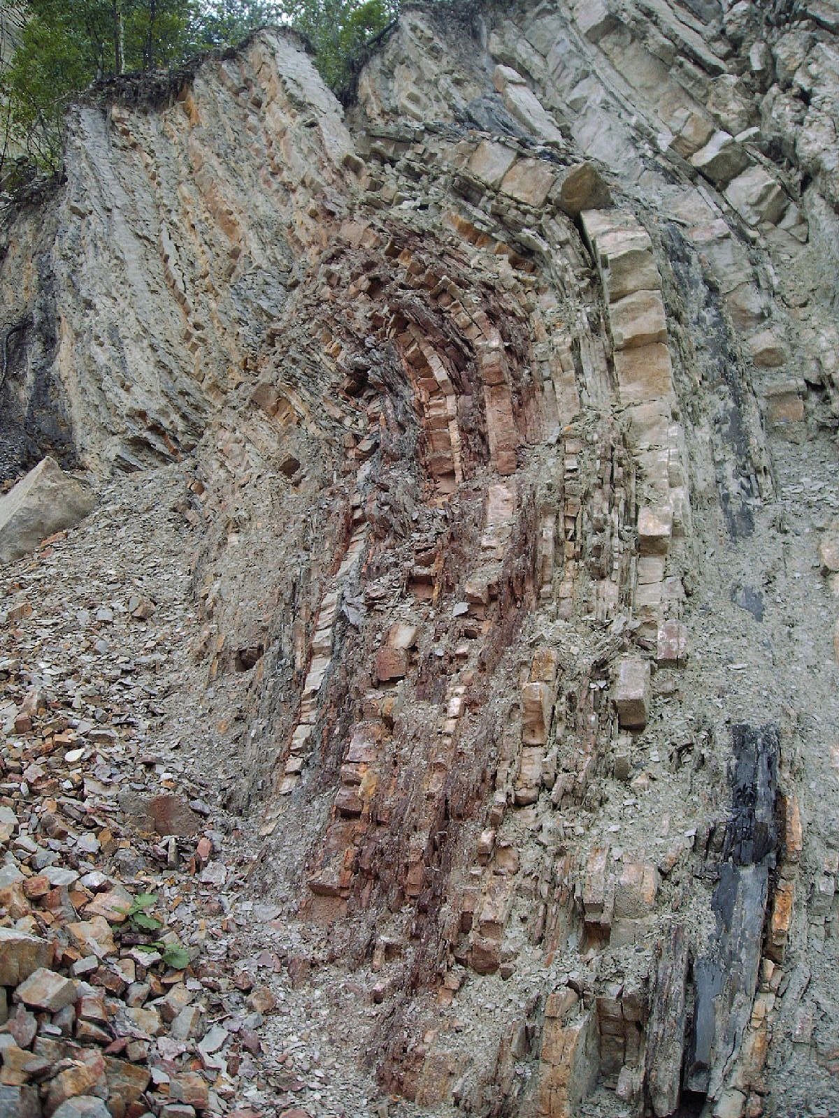 Zafałdowany dolny kambr, reprezentowany przez kwarcyty osadowe, k. Wiśniówka Duża, okolie Kielc